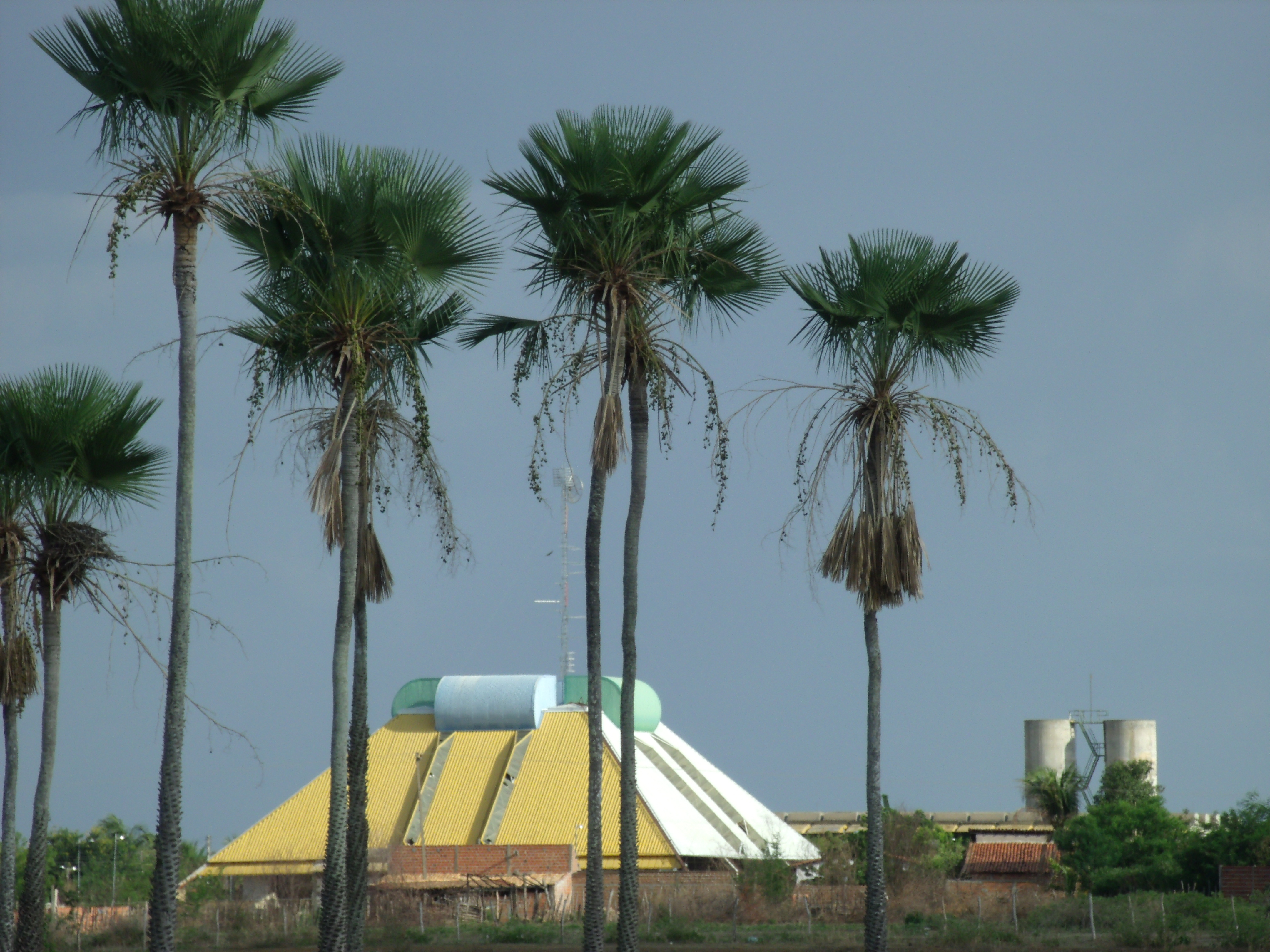 Vista de carnaubeiras e de uma arquitetura piramidal no Piauí.